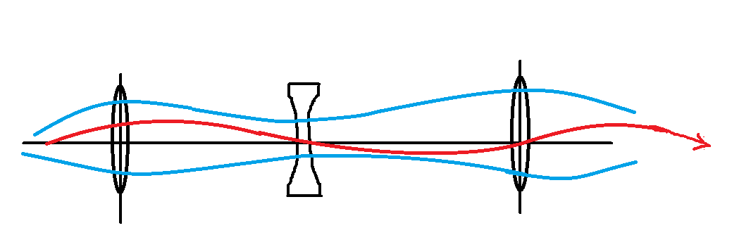 סריג של עדשות מרכזות ומפזרות למיקוד אלומות